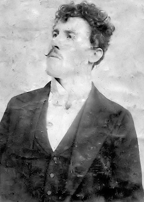 Retrato de Romualdo Prati